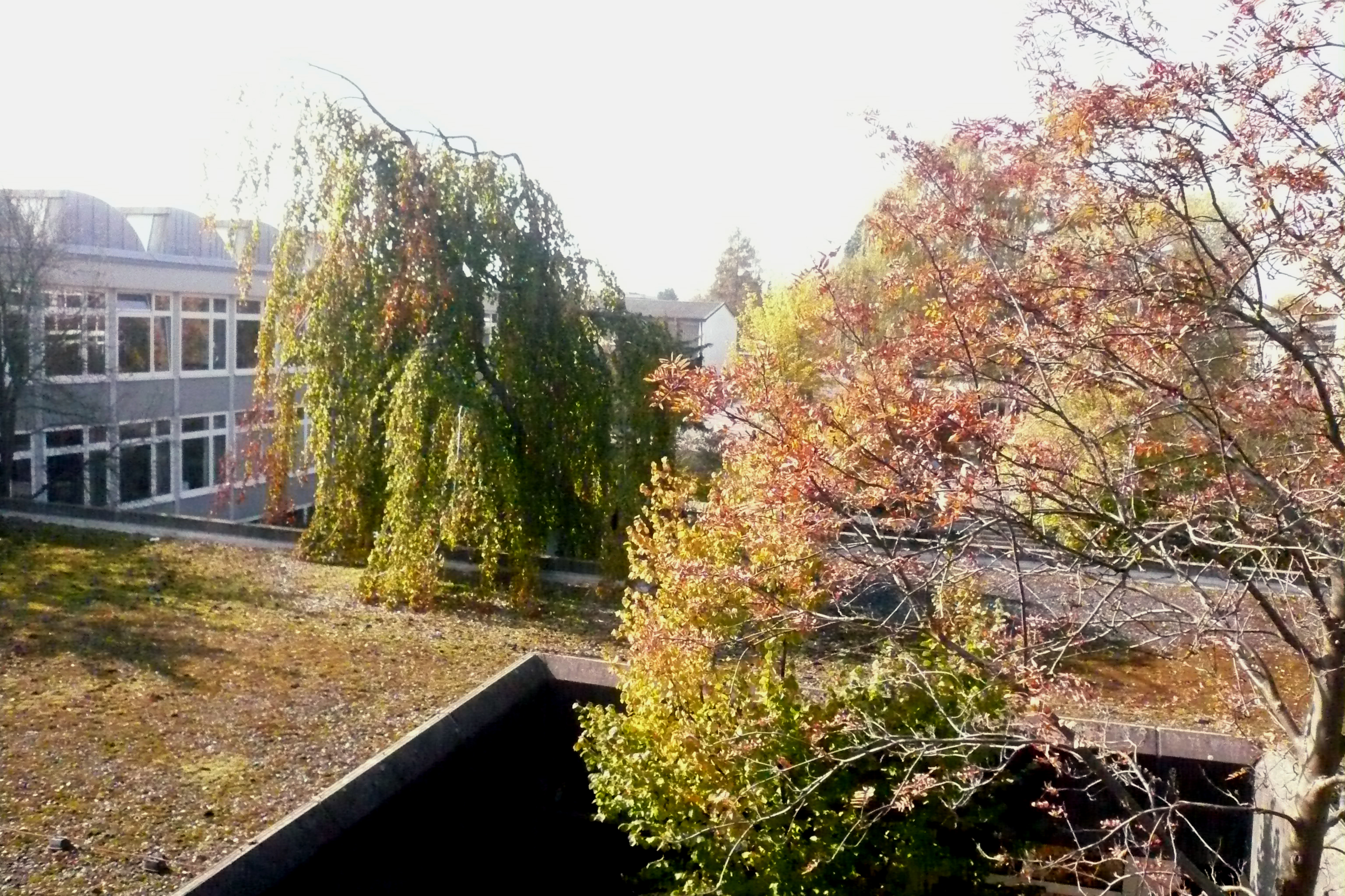 Übersicht